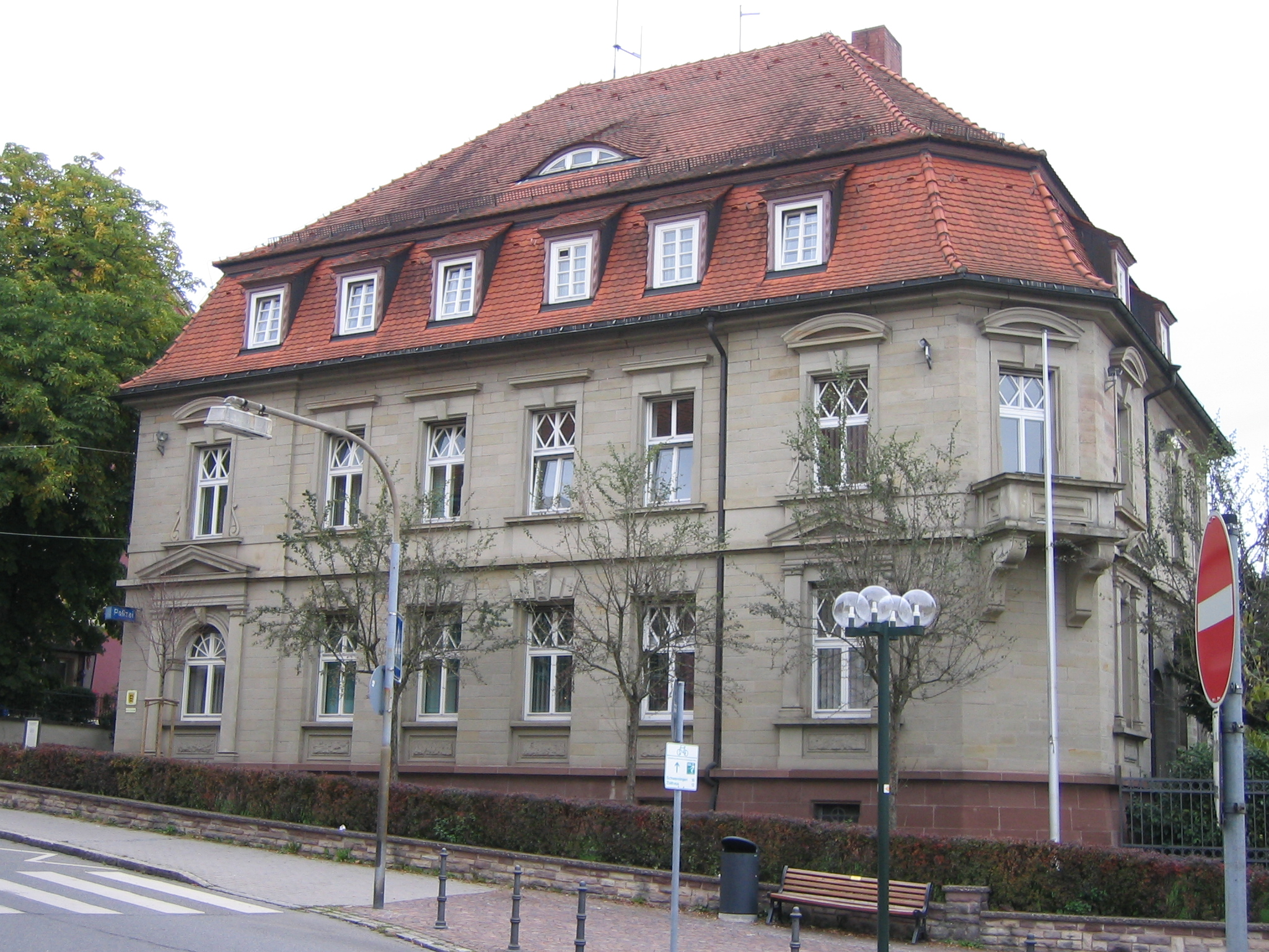 Gebäude des ehemaligen Finanzamtes in Donaueschingen